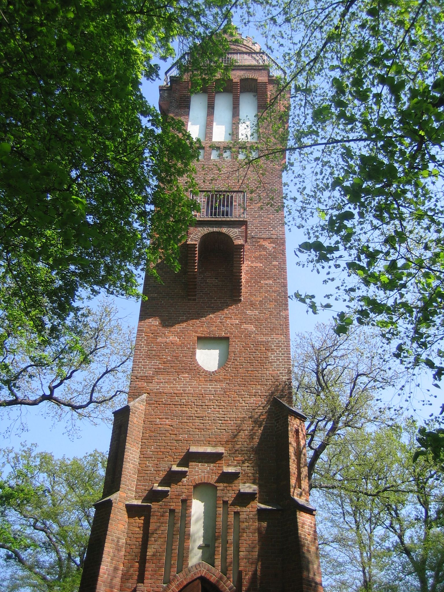 Aussichtsturm Behmshöhe im Nemerower Holz, Neubrandenburg, Mecklenburg-Vorpommern